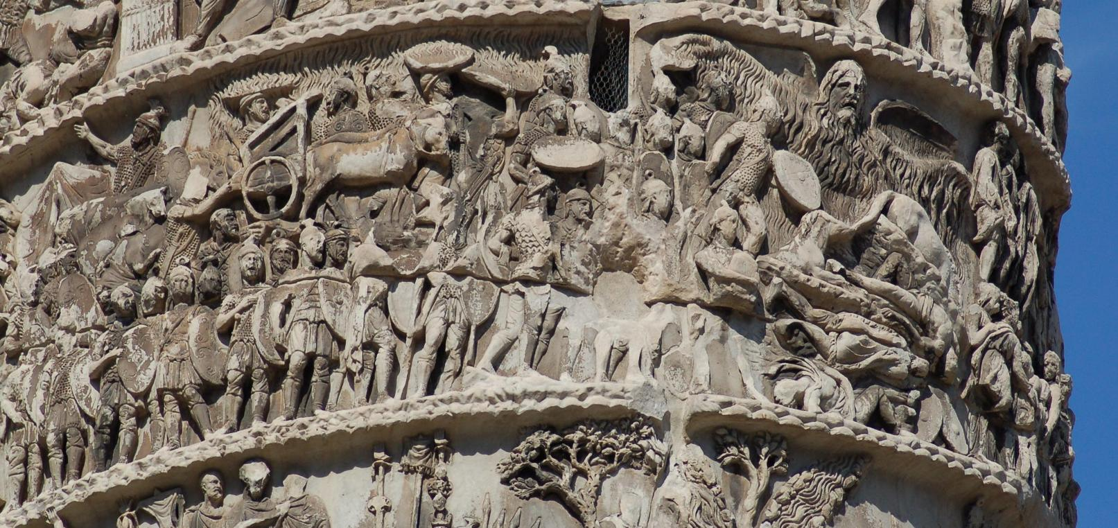 Il miracolo della pioggia sulla Colonna di Marco Aurelio